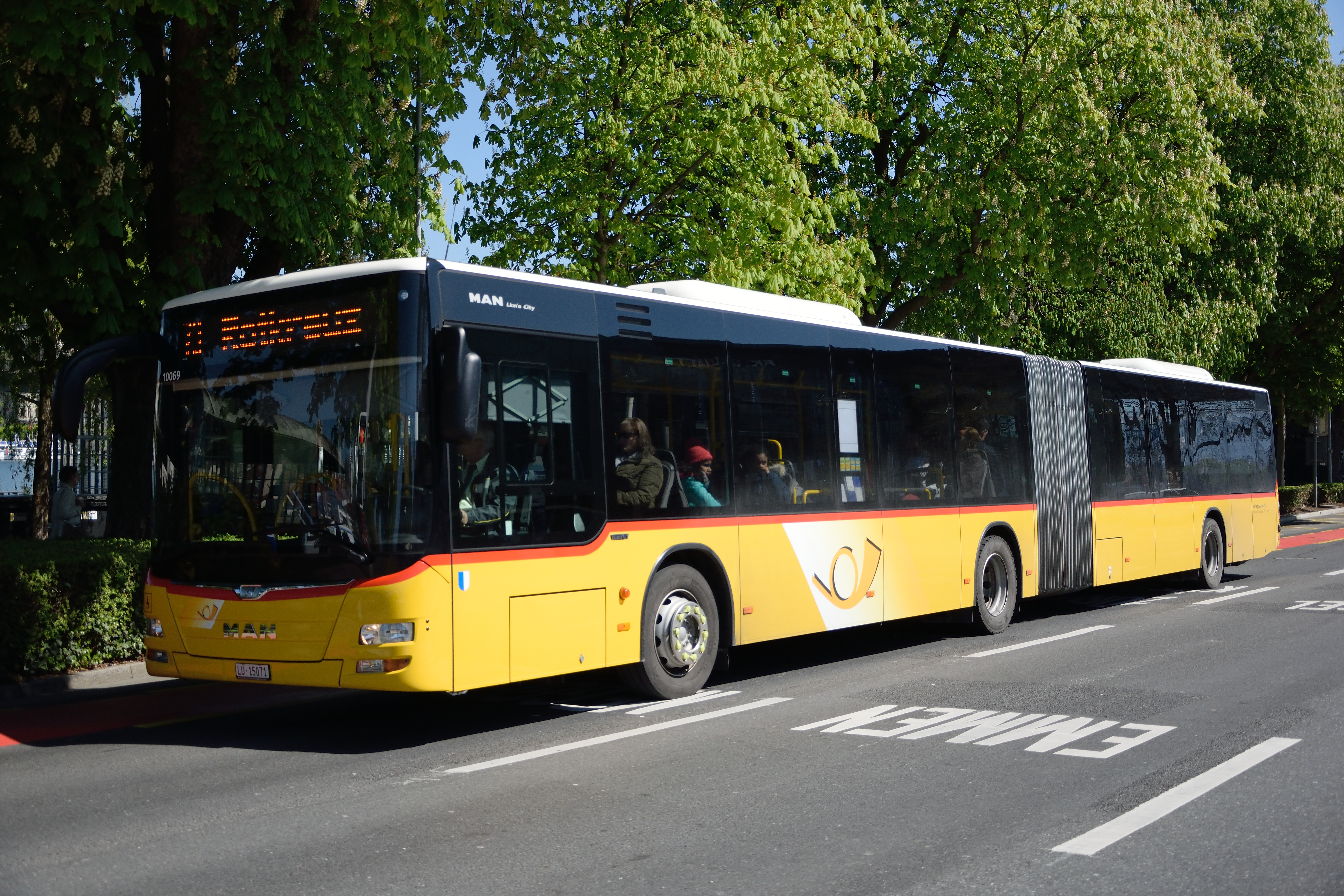 Autobus articulé Car Postal quittant le parvis de la gare SBB CFF FFS de Lucerne